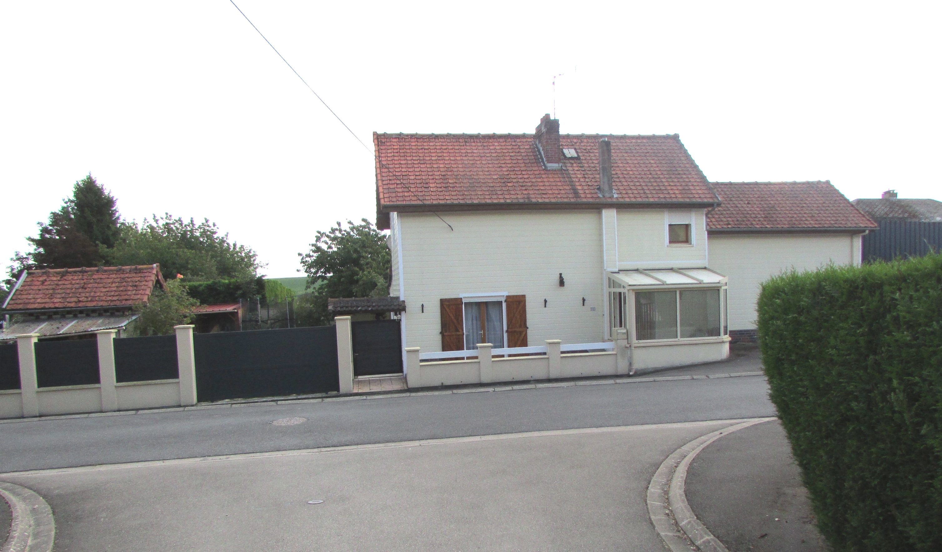 La gare de Beaurevoir en 2017.